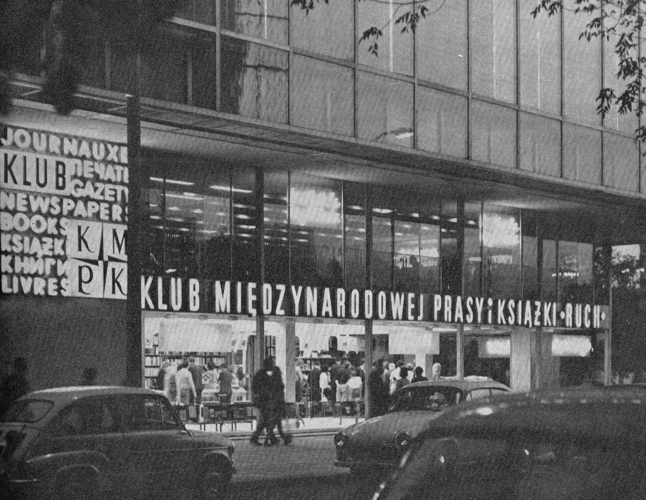 Klub Międzynarodowej Prasy i Książki na Ścianie Wschodniej (Domy Towarowe Centrum) w Warszawie